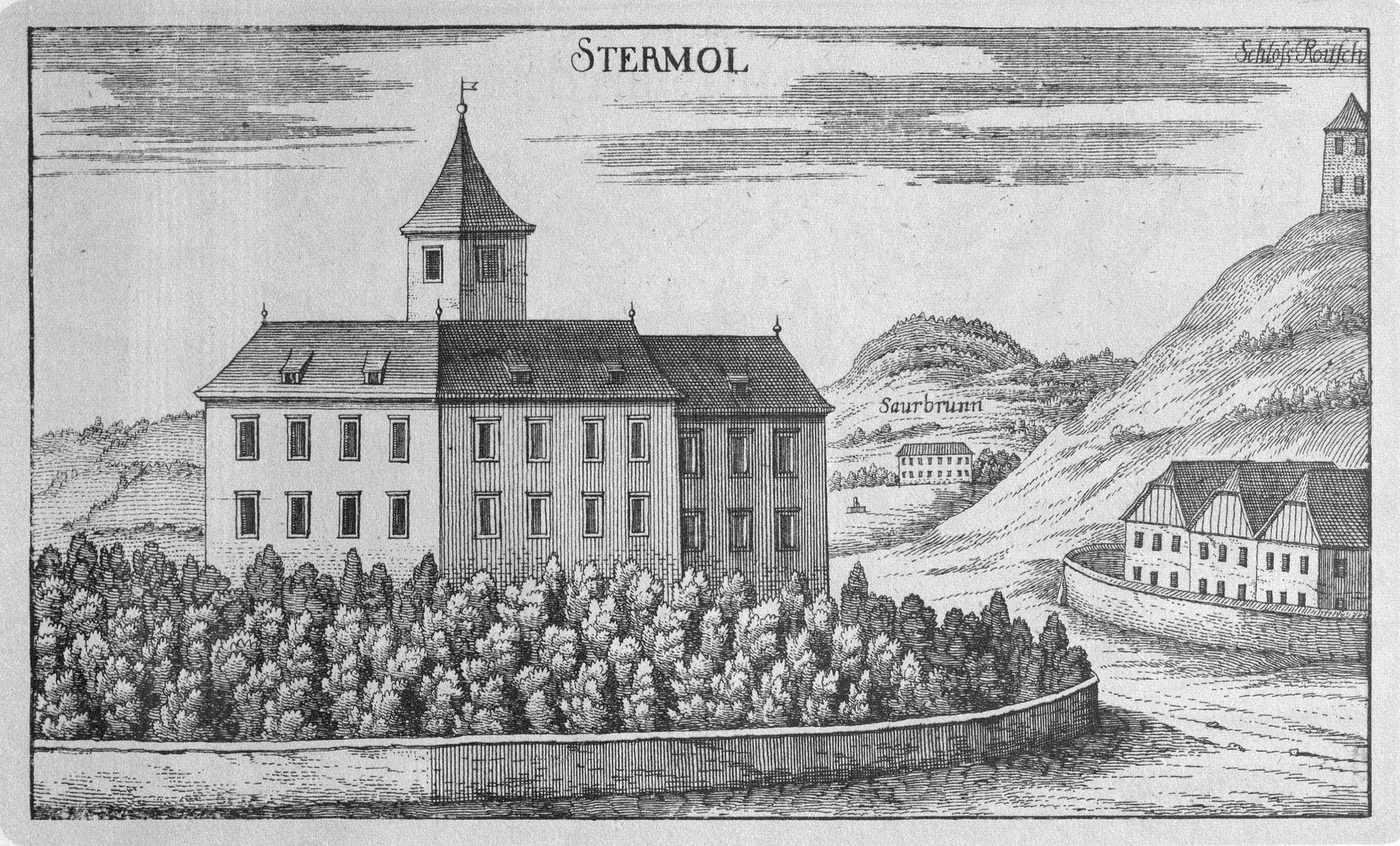 G. M. Vischers Käyserlichen Geographi, Topographia Ducatus Stiriae, Das ist: Eigentliche Delineation / und Abbildung aller Städte / Schlösser / Marcktfleck / Lustgärten / Probsteyen / Stiffter / Clöster und Kirchen / so es sich im Herzogthumb Steyrmarck befinden; Und anjetzo Umb einen billichen Preyß zu finden seynd Bey Johann Bitsch Universitäts Buchhandlern / Auff dem Juden=Platz bey der guldenen Saulen. Graz 1681 Die Nummerierung der Dateien folgt der alphabetischen Reihung der Ortsnamen und entspricht nicht dem Vischer-Register